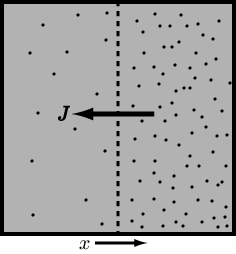 픽의 확산법칙에서 확산유량에 대한 그림